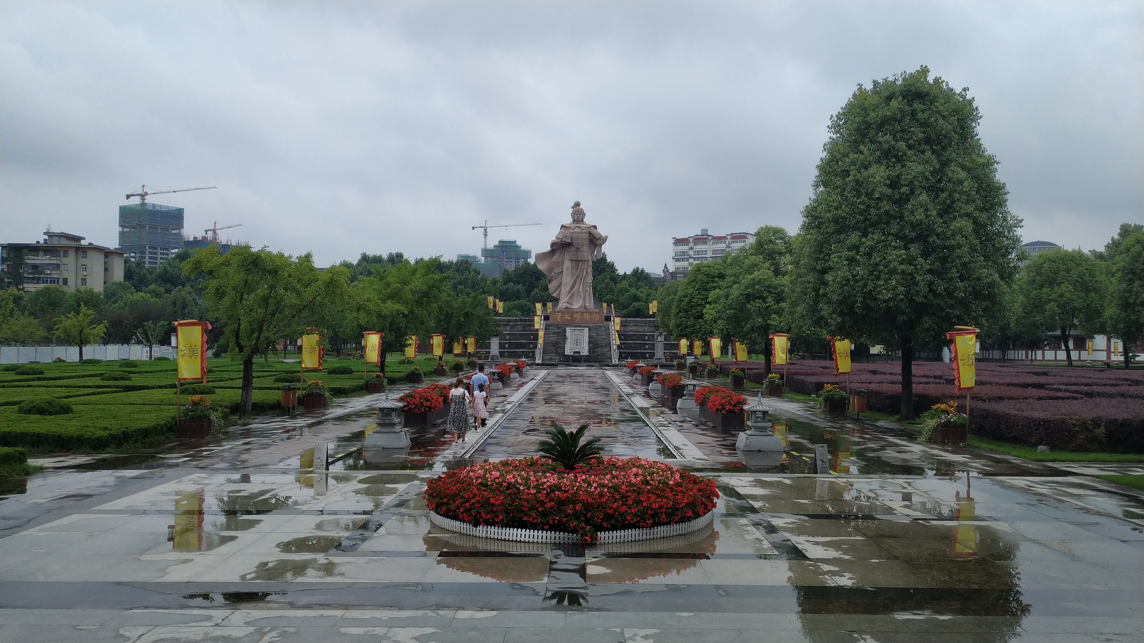 中文（中国大陆）: 汉中拜将台广场